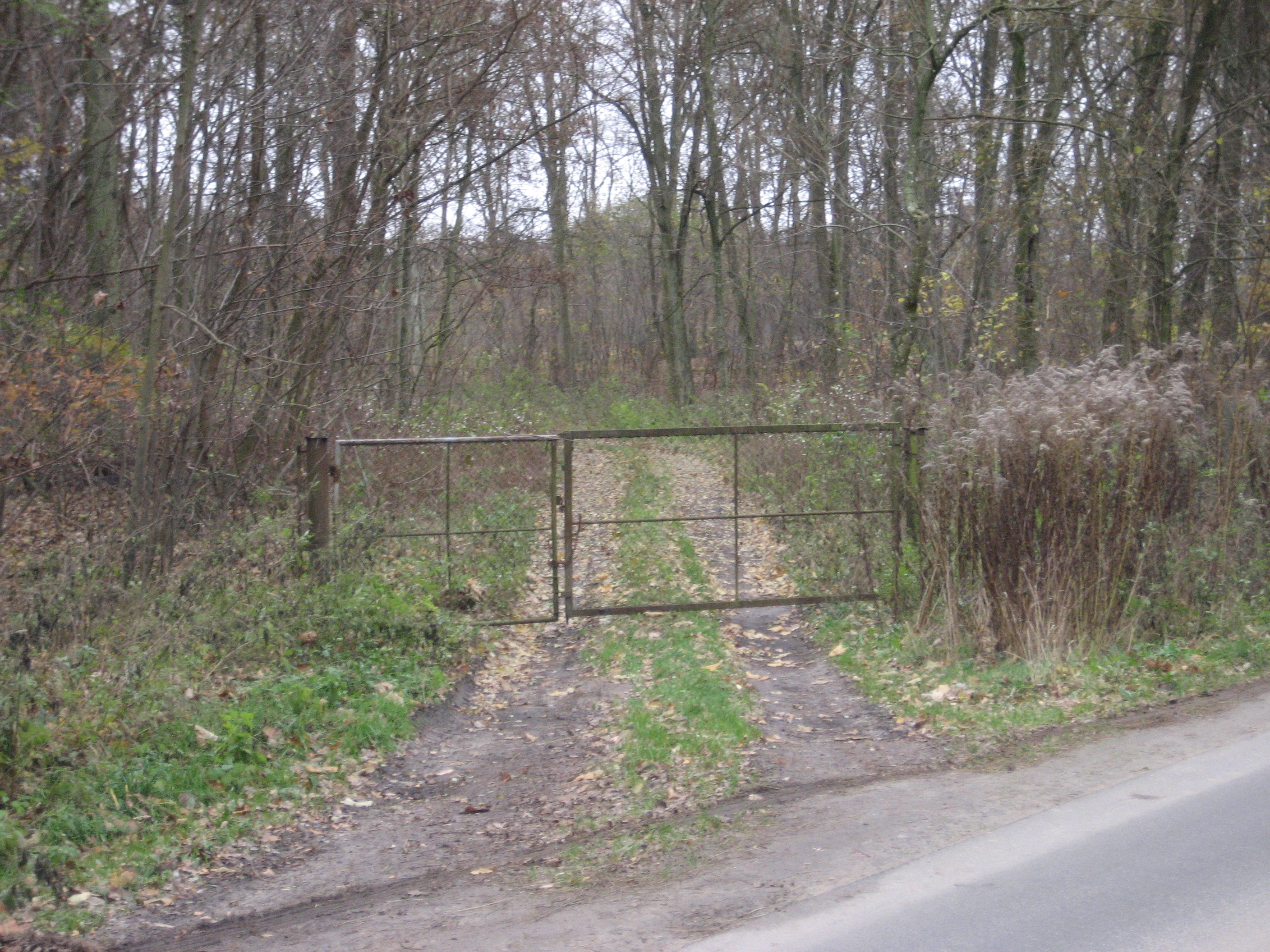 Das umzäunte Gelände mit Einfahrtstor zum ehemaligen Gutshof Salzow im Waldstück am Salzower Weg.